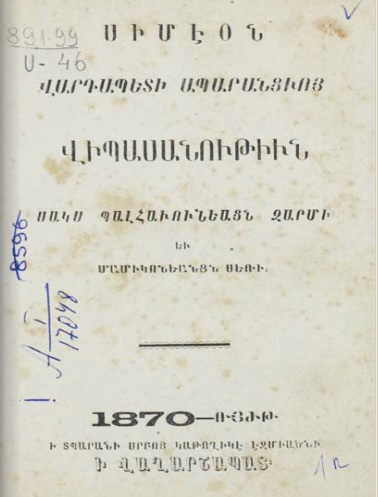 Обложка издания произведений Симеона Апаранци, 1870 год